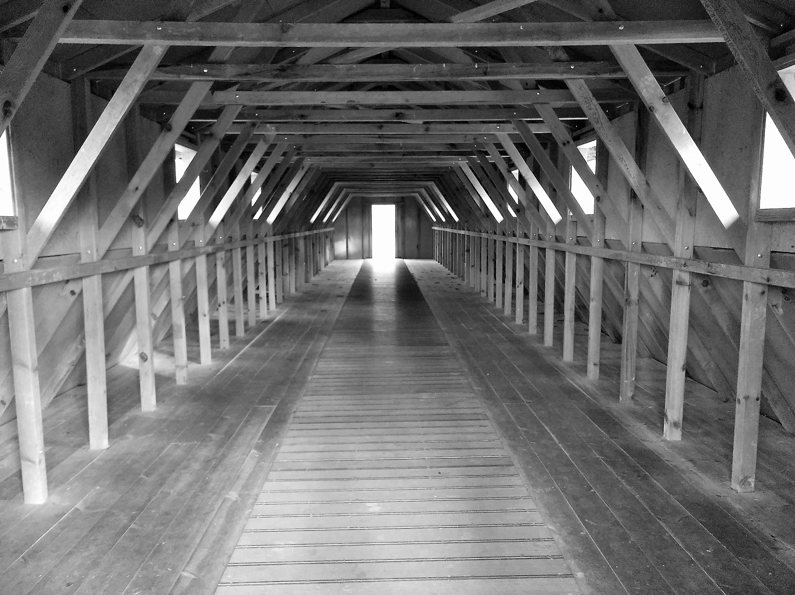 Itxuratutako barrakoi baten barneko ikuspegia, Gurseko esparrua, Bearno